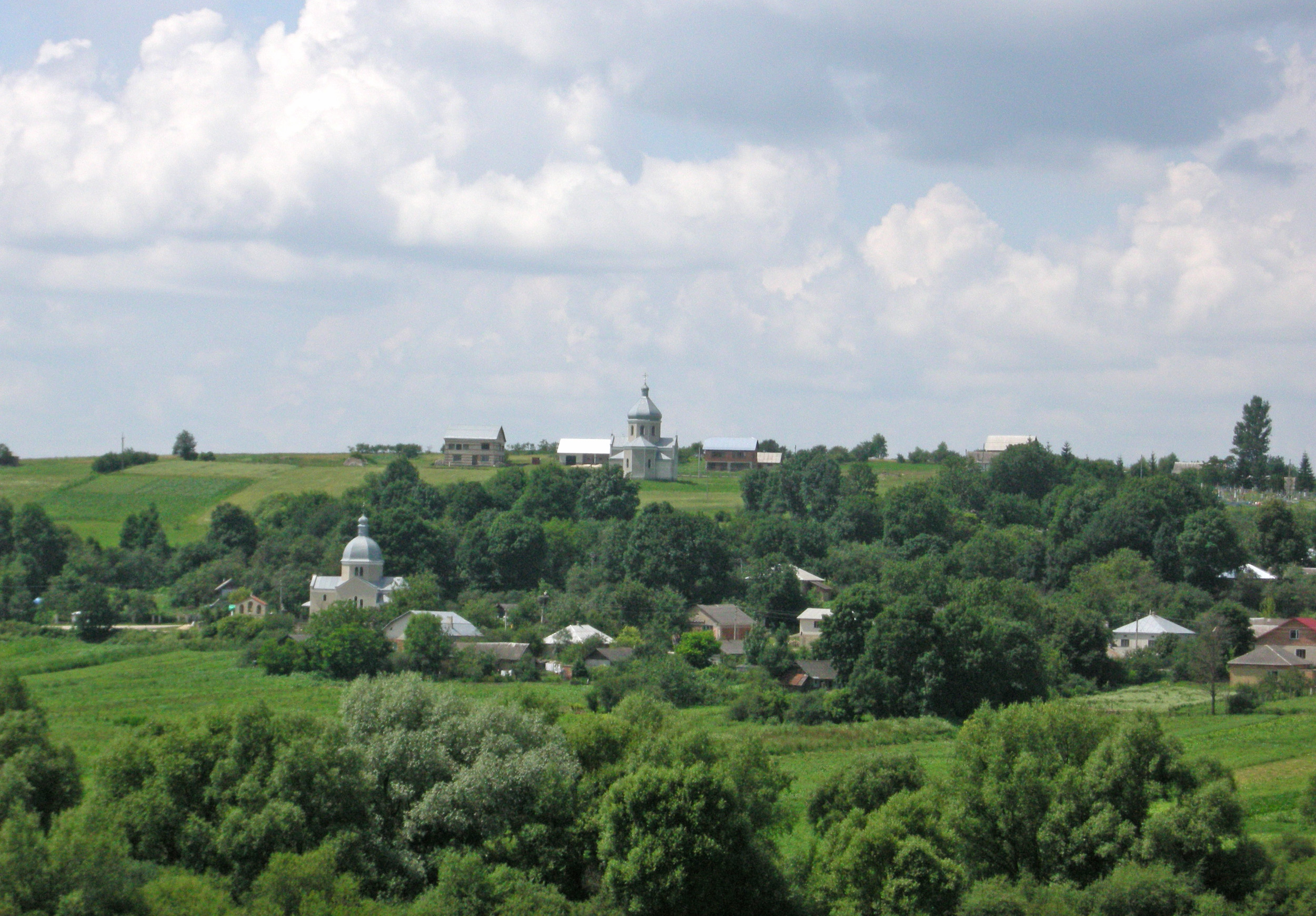 Вигляд на село Застав'є Тернопільського району Тернопільської області.